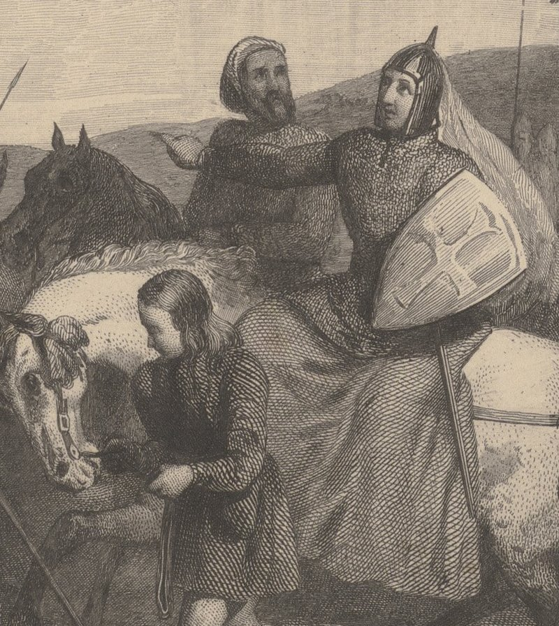 Vrouw Aleid van Kleef te paard met haar leger op weg naar de West- Friezen in 1195 "Vrouw Aleid overwint de West-Friezen" 1 hist.prent: ets en staalgravure; 141 x 179 mm l.o.: R. Craeyvanger del. ; r.o.: J.W. Kaiser sculp. Komt voor in: Algemeene Geschiedenis des Vaderlands / J.P. Arend . - Amsterdam, 1840 . - deel II . - blz. 184. 0143